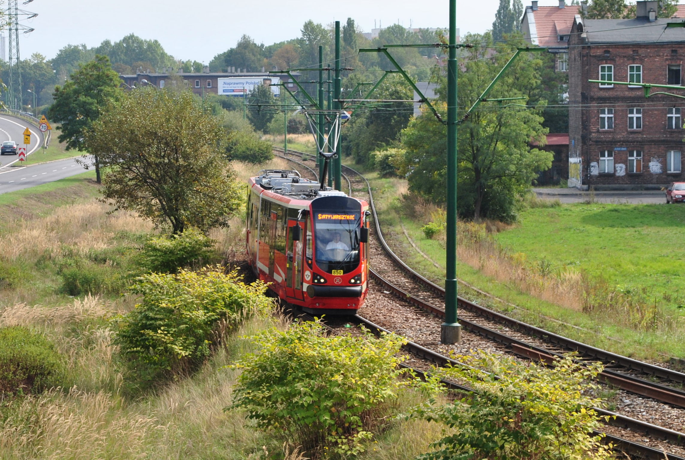 Moderus Beta MF 16 AC BD w pobliżu przystanku Załęże Wiśniowa (przejazd specjalny podczas parady z okazji Dnia Otwartego ZUR)